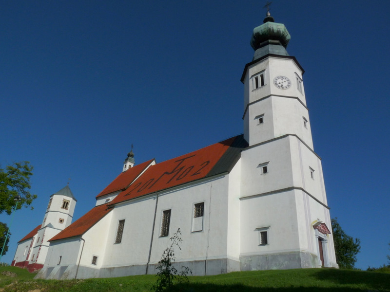 Cerkev sv. Matere božje, v ozadju sv. Ana, Spodnje Tinsko.